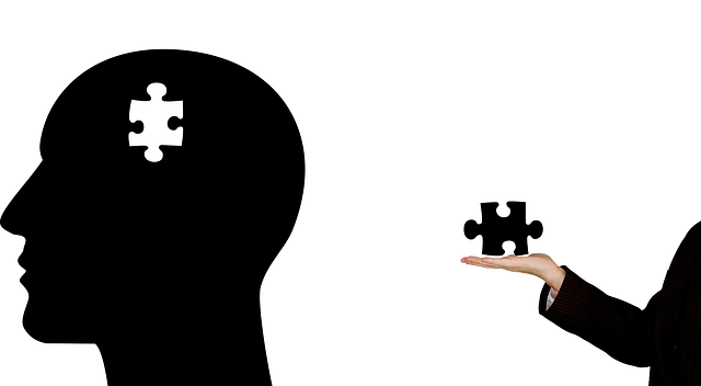 Mental hälsa där en pusselbit saknas och ges av tredje part, nämligen en terapeut.